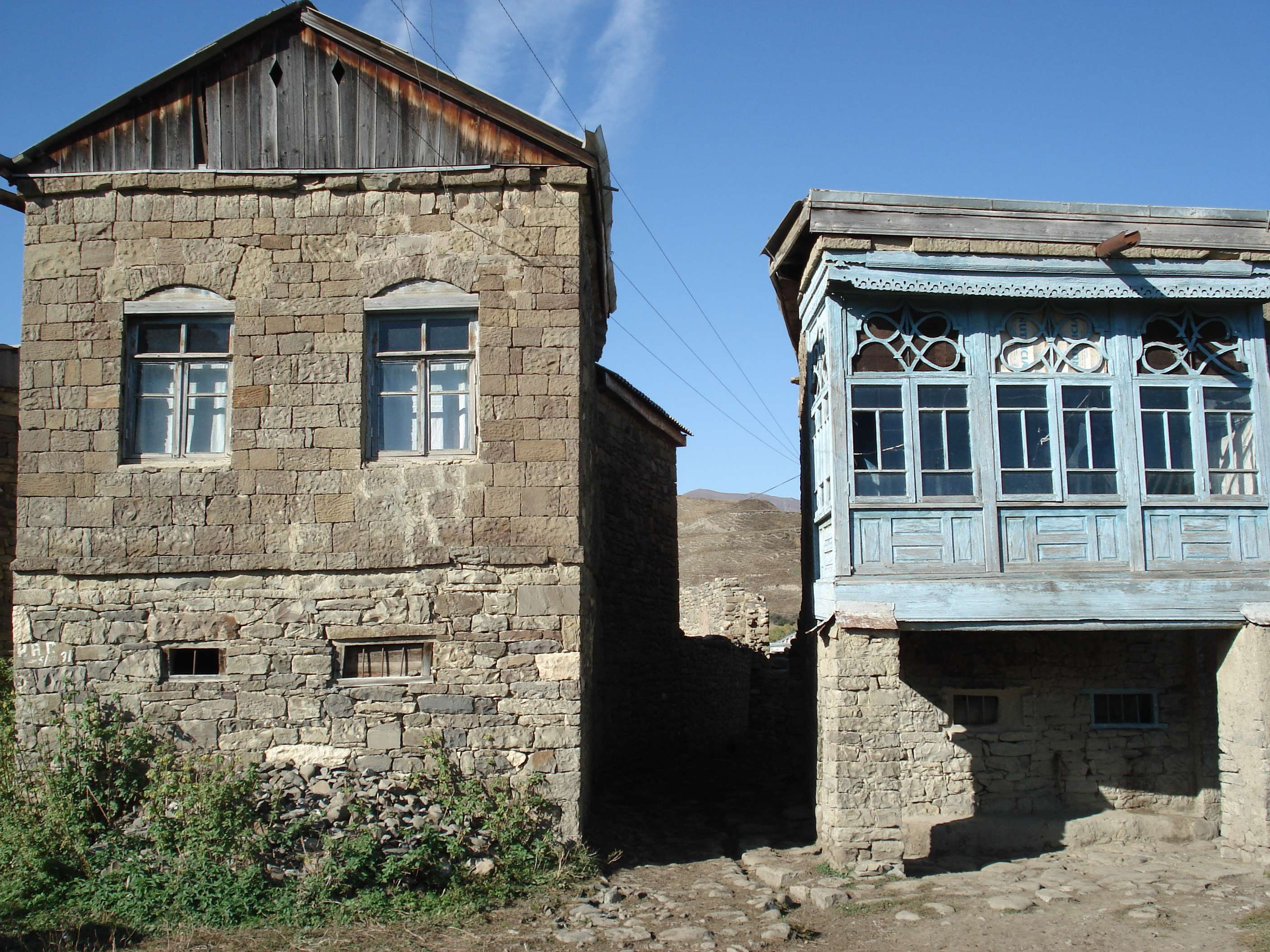 Лакский район, с. Хури